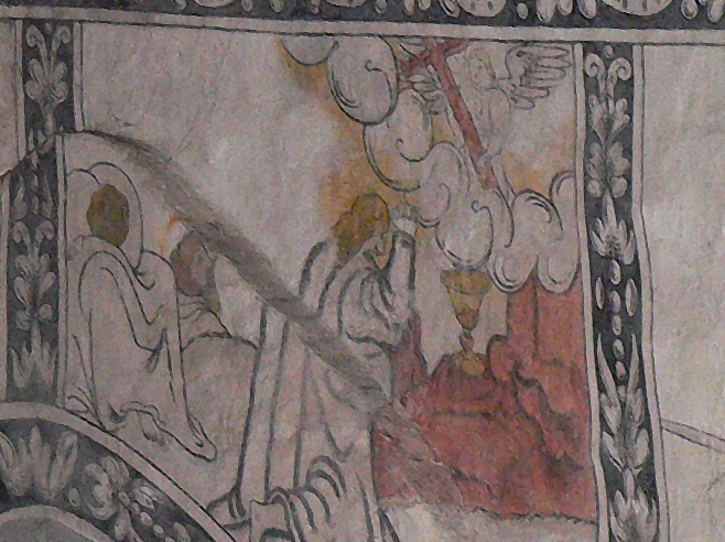 Evangelische Kirche St. Laurentius in Dassel, Niedersachsen, Deutschland - Protestantische Renaissancemalerei (Secco): "Vor den Toren Jerusalems" von 1577